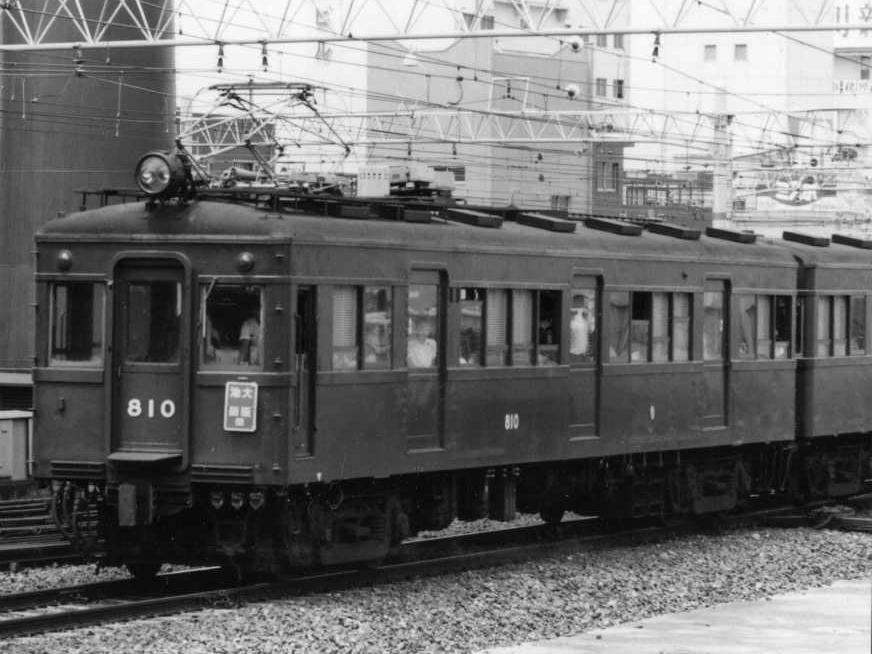 原型ライトでシールドビーム2灯化された当時の810